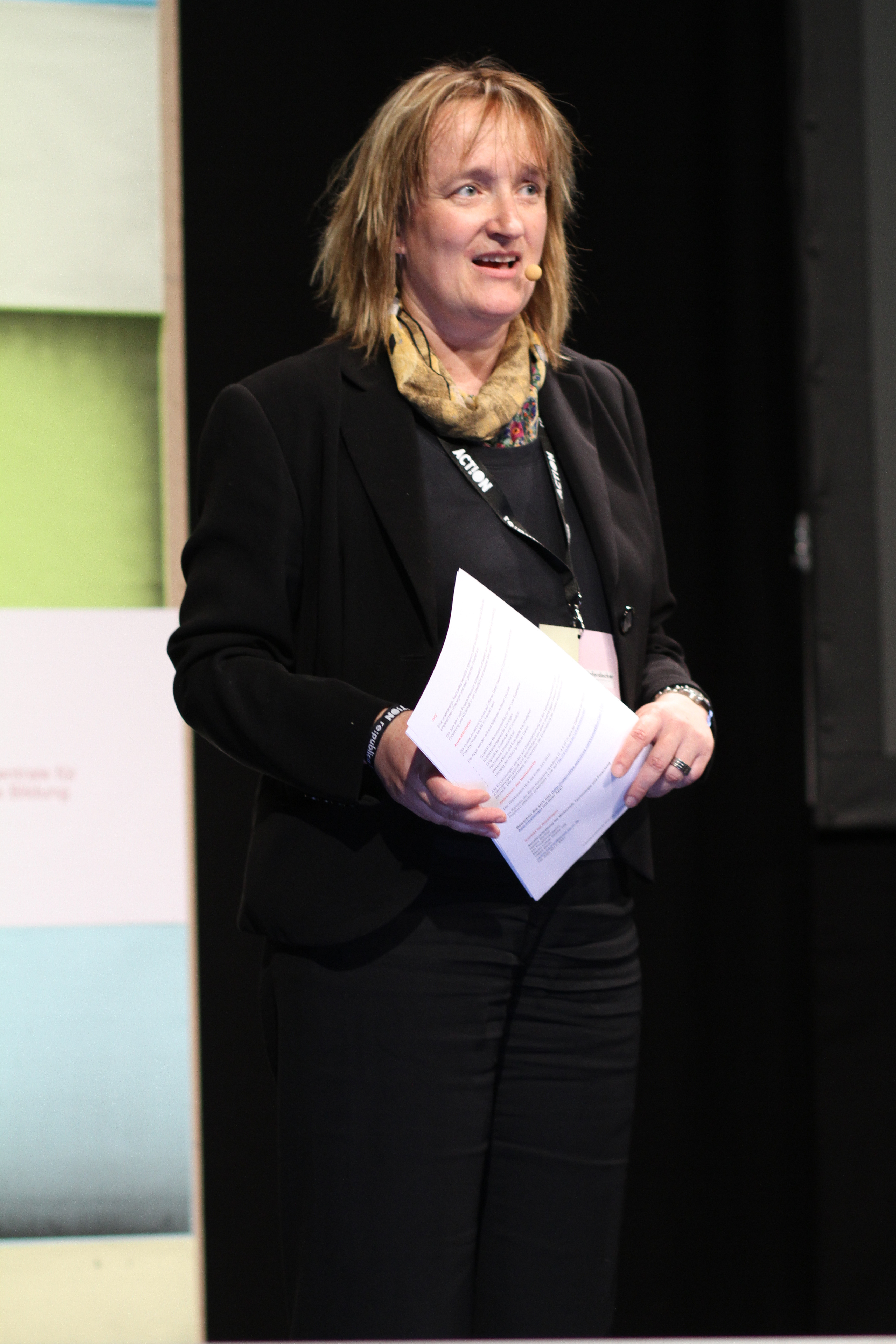 Ina Schieferdeckers talk